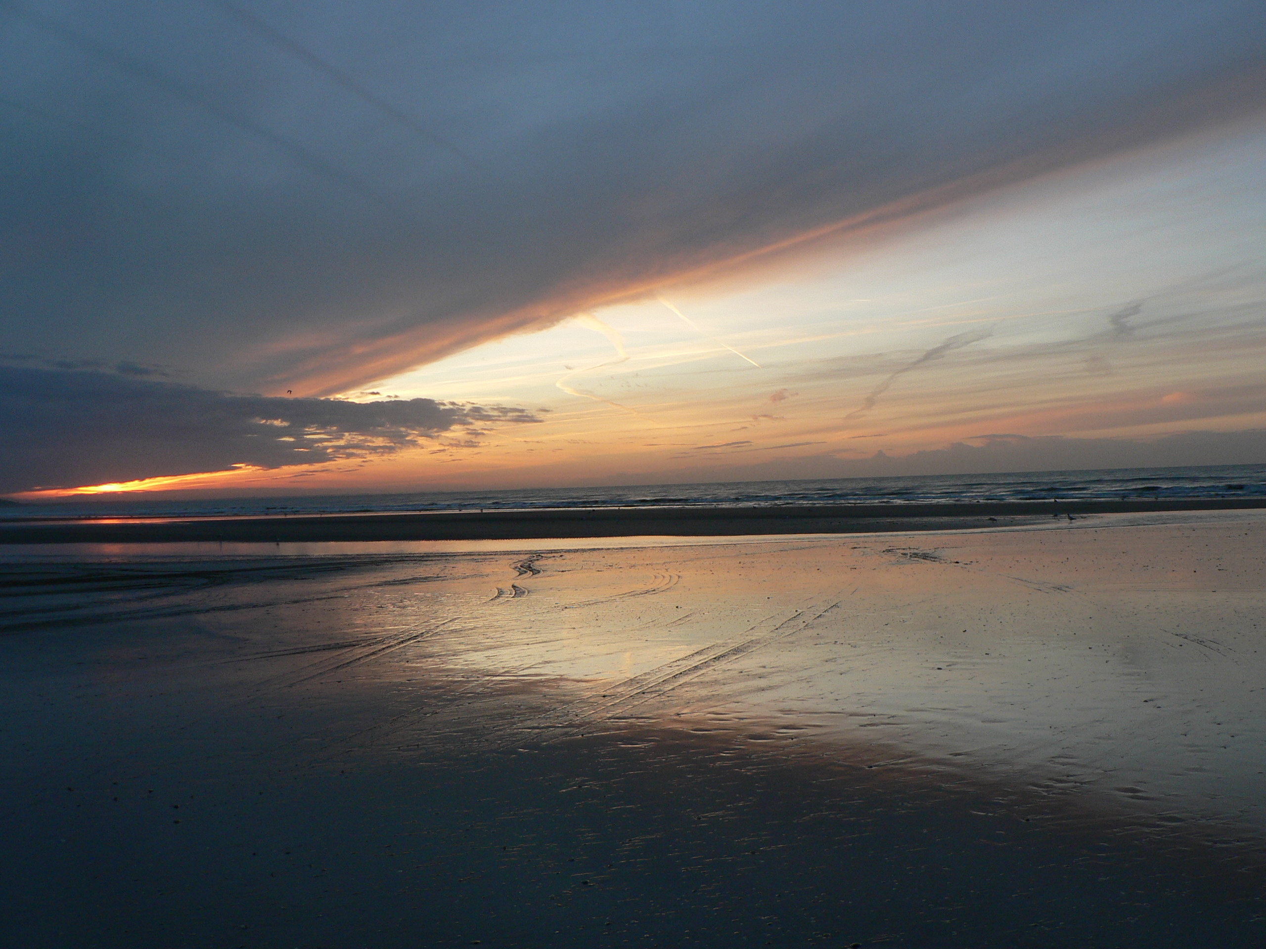 Plage de Deauville (Normandie/France) à marée basse / Deauville beach (Normandy/France) at low tide